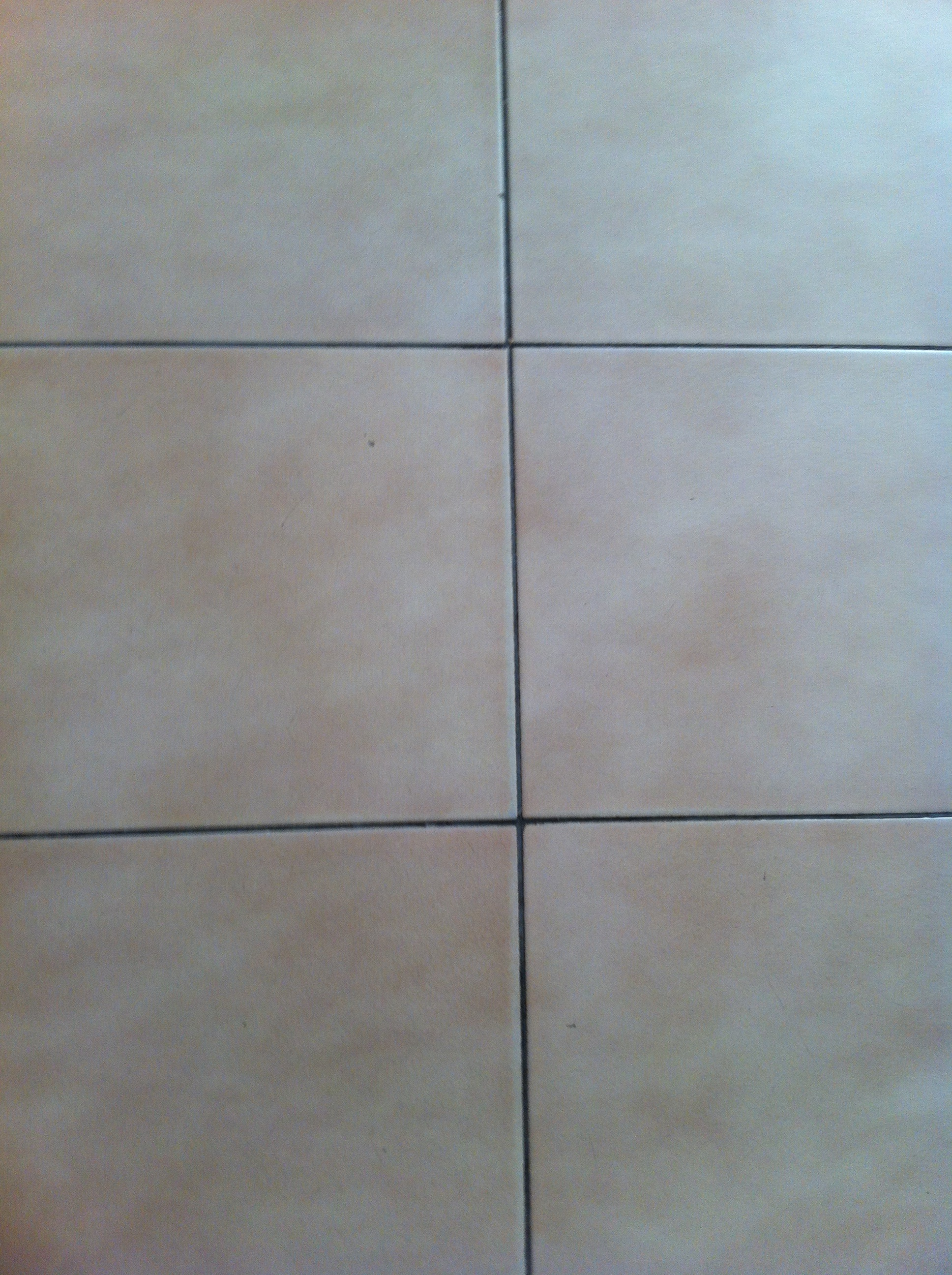 Rejunte preto